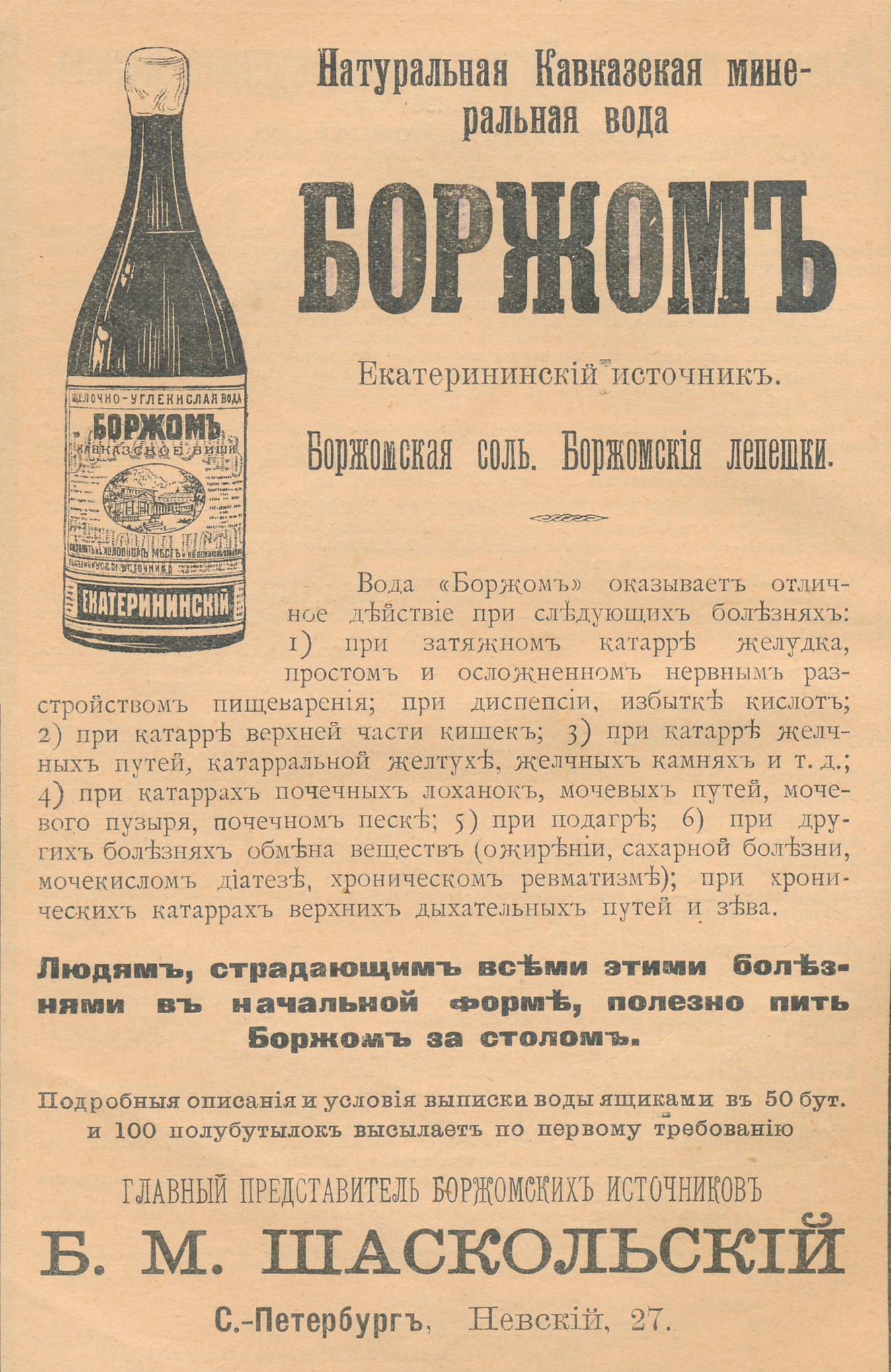 Реклама Боржоми, "Всеобщий календарь на 1909 год", с. 14 вкладки.